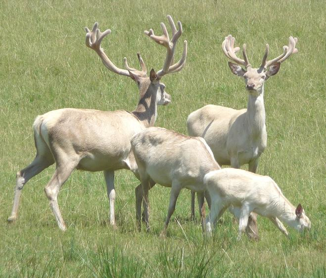 2 cerfs blancs dont les bois sont en fin de croissance. La photo est prise à la fin Juin 2008, alors que les bois précédents ne sont tombés que 2 à 3 mois plus tôt. Ces cerfs et biches blancs sont visibles en France, au Moulin de Poyaller, dans les Landes